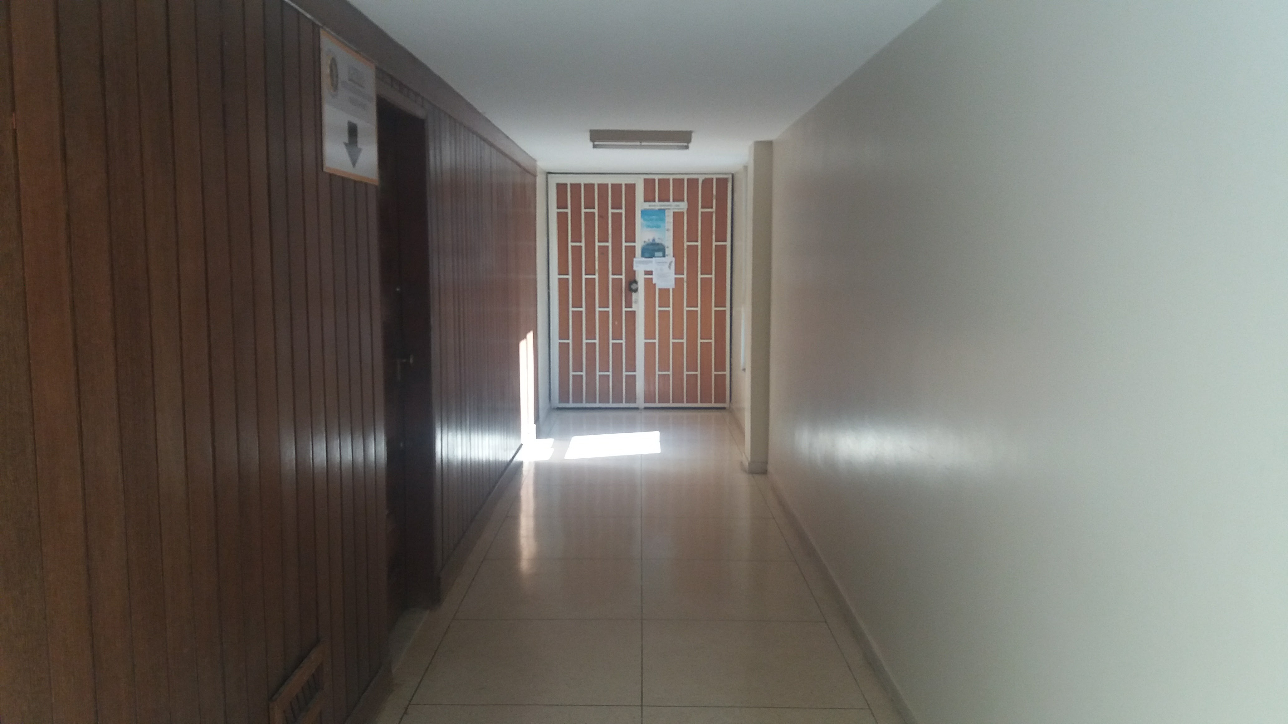 Koridoro al la enirporto de Brazila Esperanto-Ligo